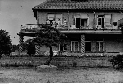 Dom w "Mądralinie" wybudowany na użytek polskich uczonych na zamówienie St. F. Hiszpańskiego